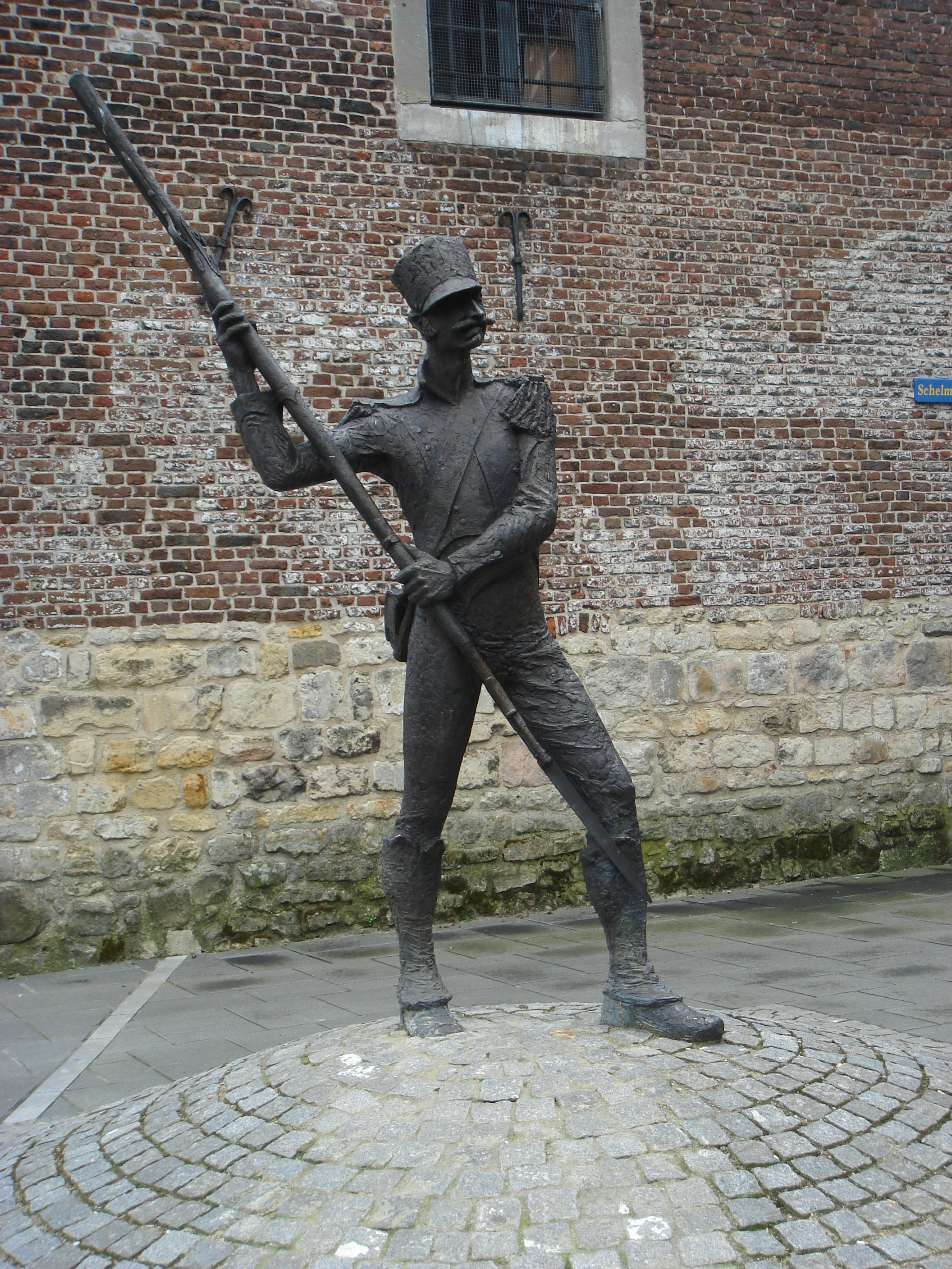 Bronze Statue. D’r Kueb va Hehle, Vera van Hasselt – 1971